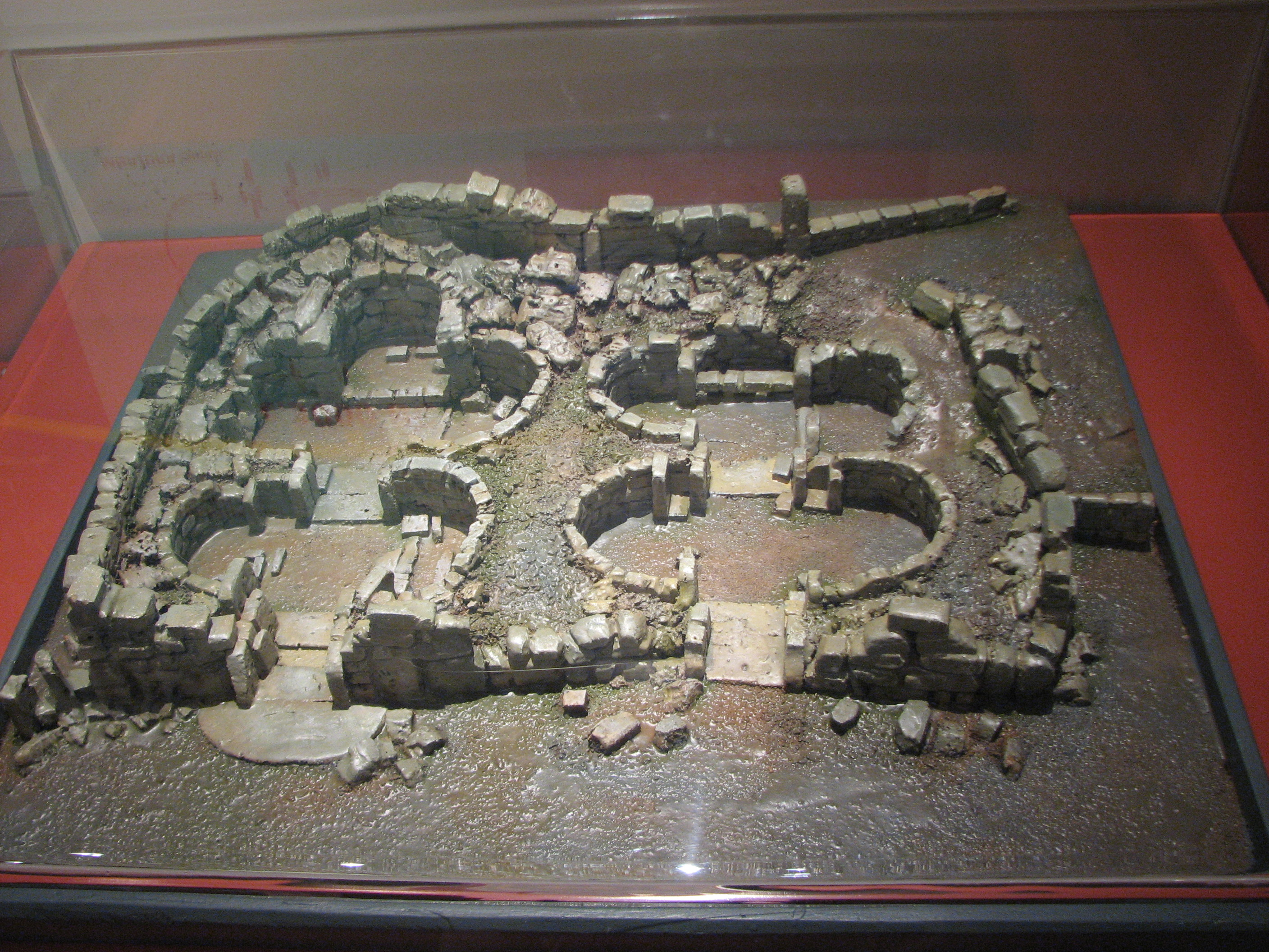 Ġgantija (Džgantija), neolitski megalitski tempeljski kompleks na malteškem otoku Gozo, zgrajen okrog leta 3.600 pr. n. št.. Maketa svetišča.